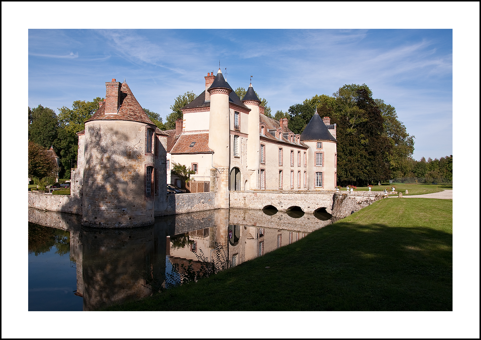 Superbe "petit" château près de chez moi. Accessible seulement les journées du patrimoine. Le parc est composé d'arbres rares et magnifiques. Je vais essayer d'y retourner à l'automne, mais il y a des gros chiens qui gardent l'accès.